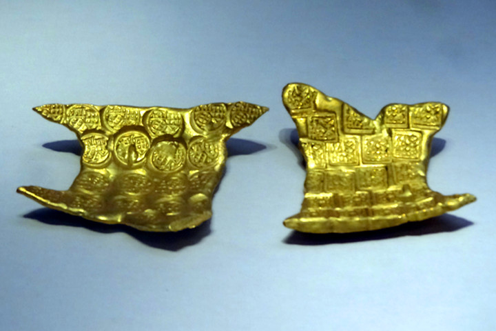 “郢爰”、“卢金”金币，战国·楚，1979年安徽寿县出土。